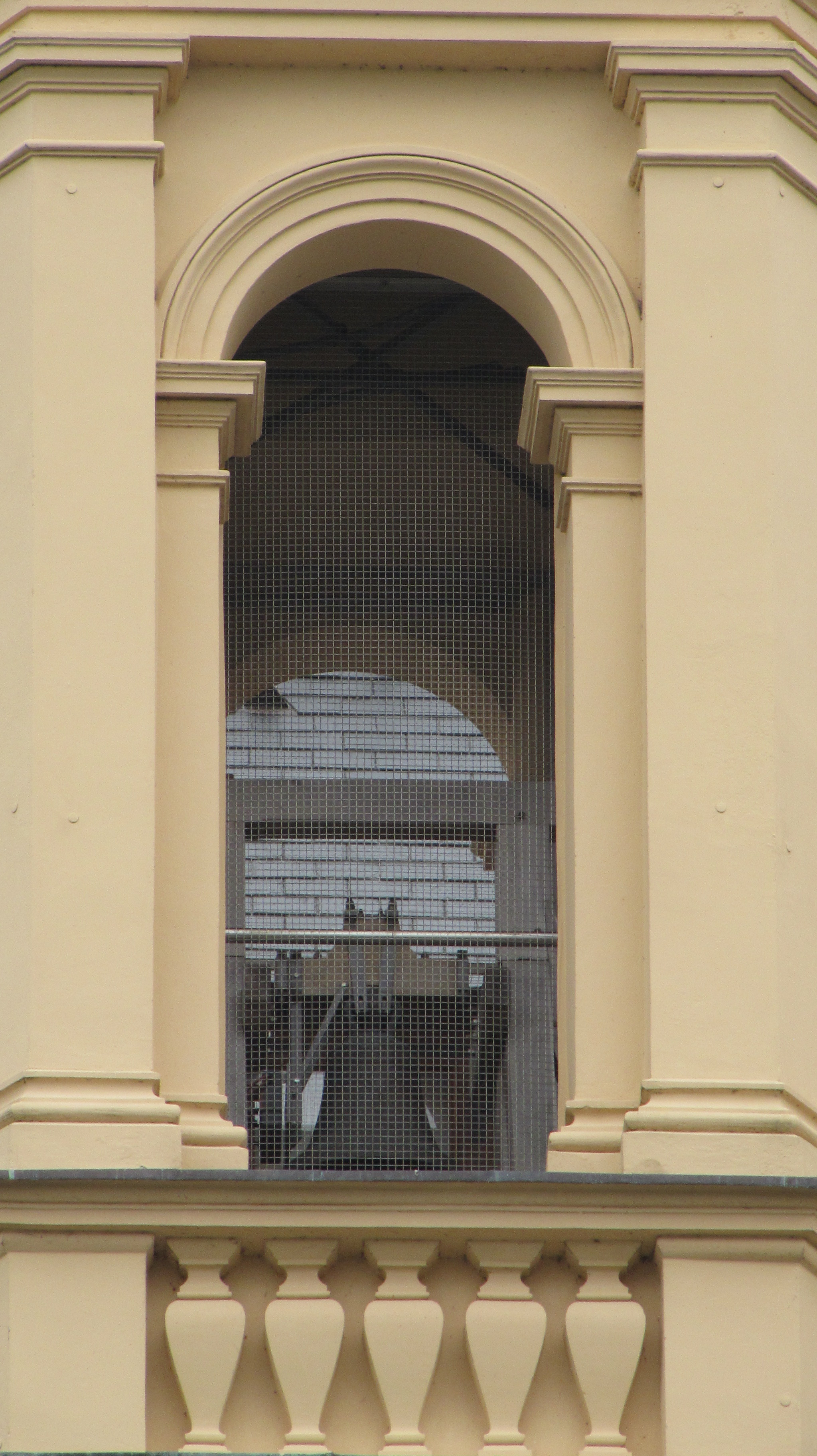 Schwerin, Schloss: Glocke von Rickert de Monkehagen, 1464, Schlagton as2, Ø 564 mm, 130 kg.